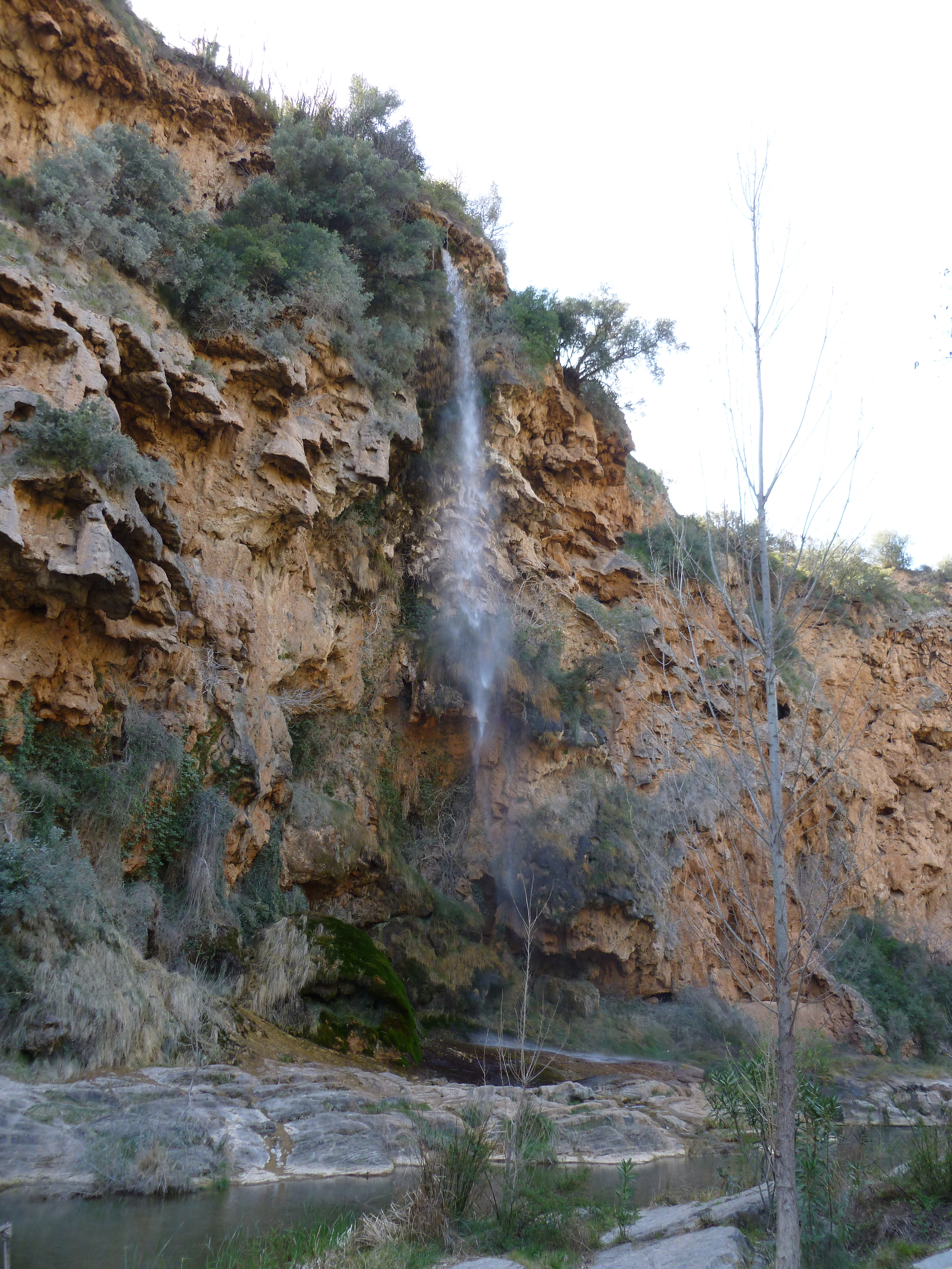 Salto de la Novia, en Navajas (provincia de Castellón, España) This is a photography of a Special Area of Conservation in Spain with the ID: ES5232003. Natura2000 entry, EEA entry